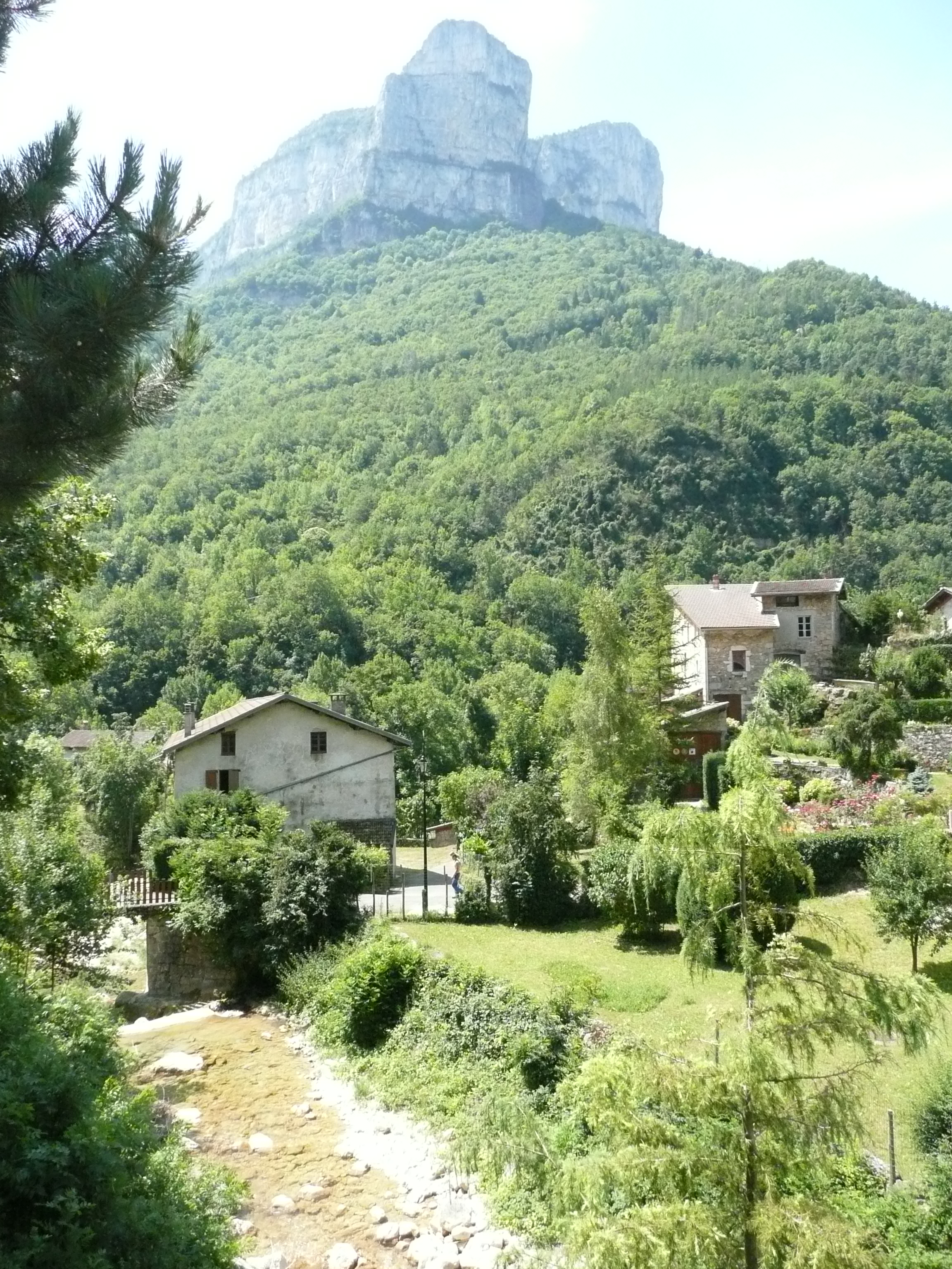 village de Choranche dans le départment de l'Isère